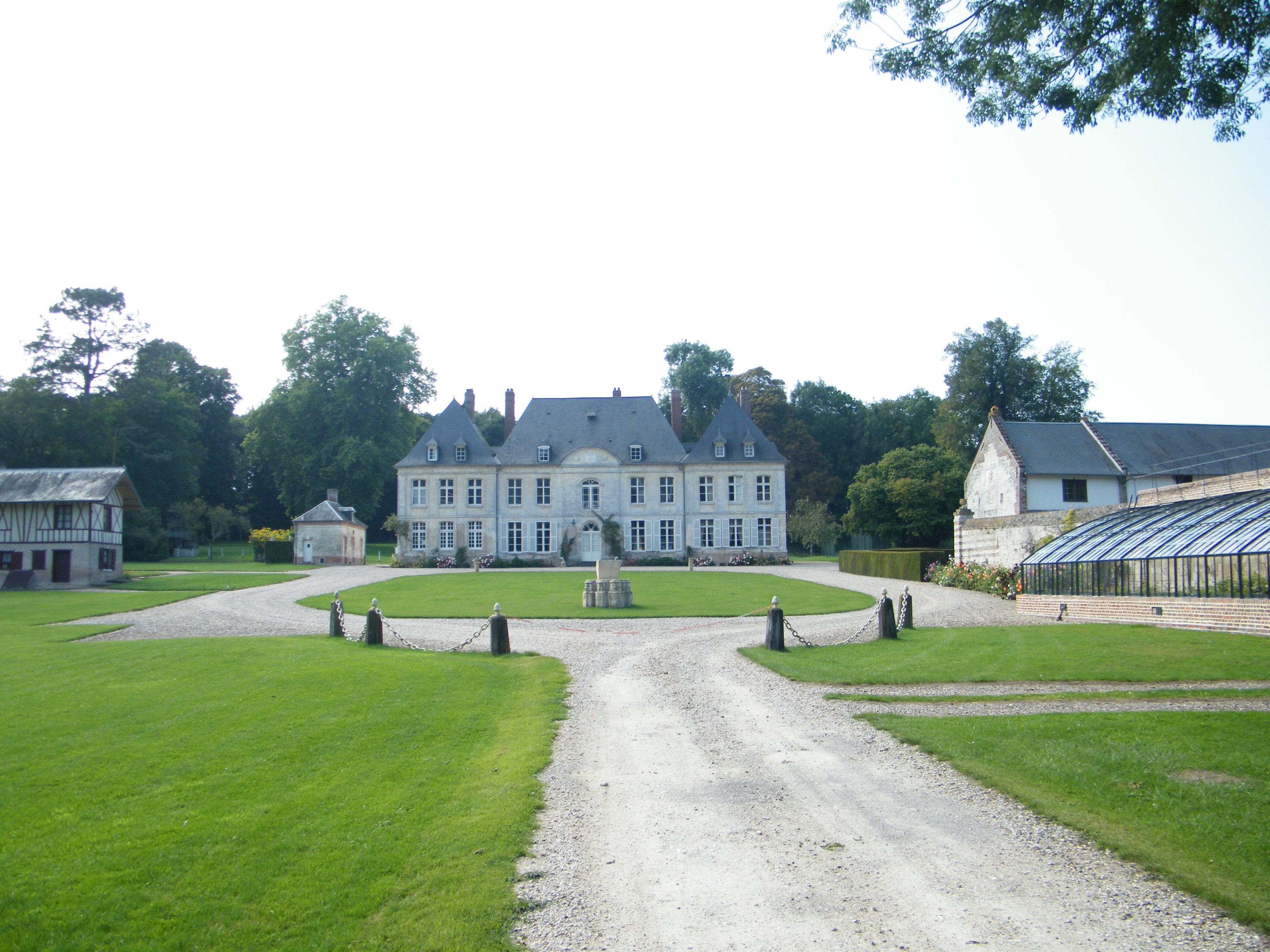 Tailly-l'arbre-à-mouches, Somme, Fr, château (2)